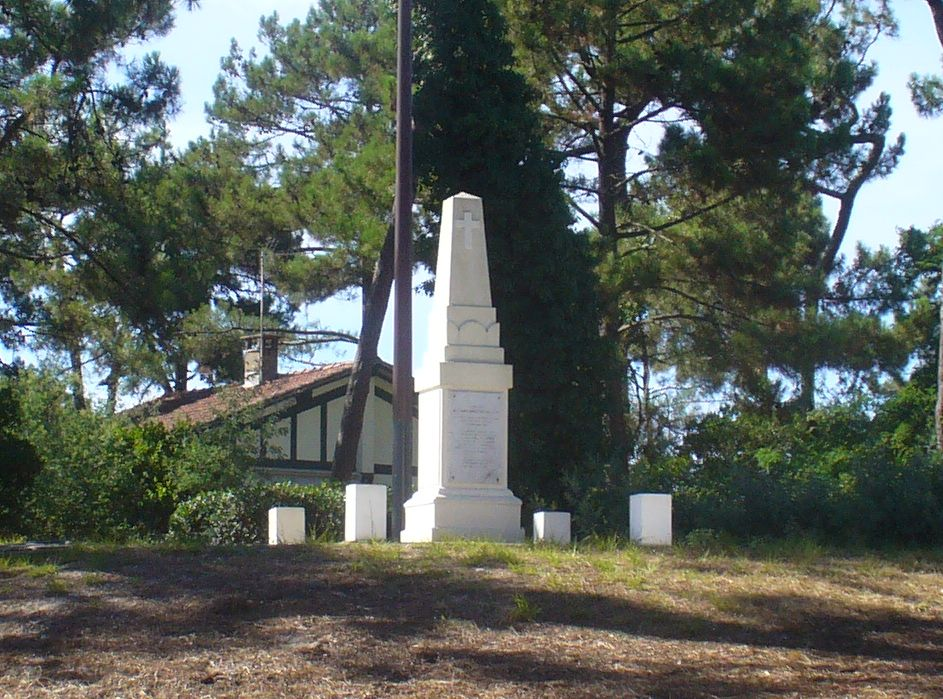 Guyot de Salins